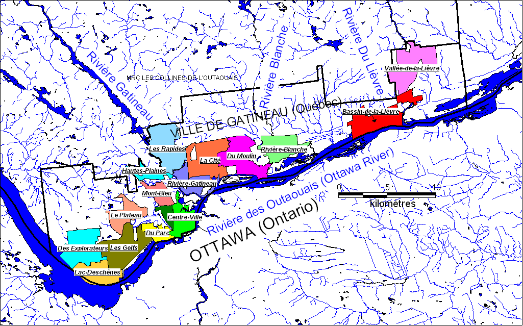 L'ensemble des villages utbains de gatineau, fait par moi Louis-Marie Poissant, ColocaTerre